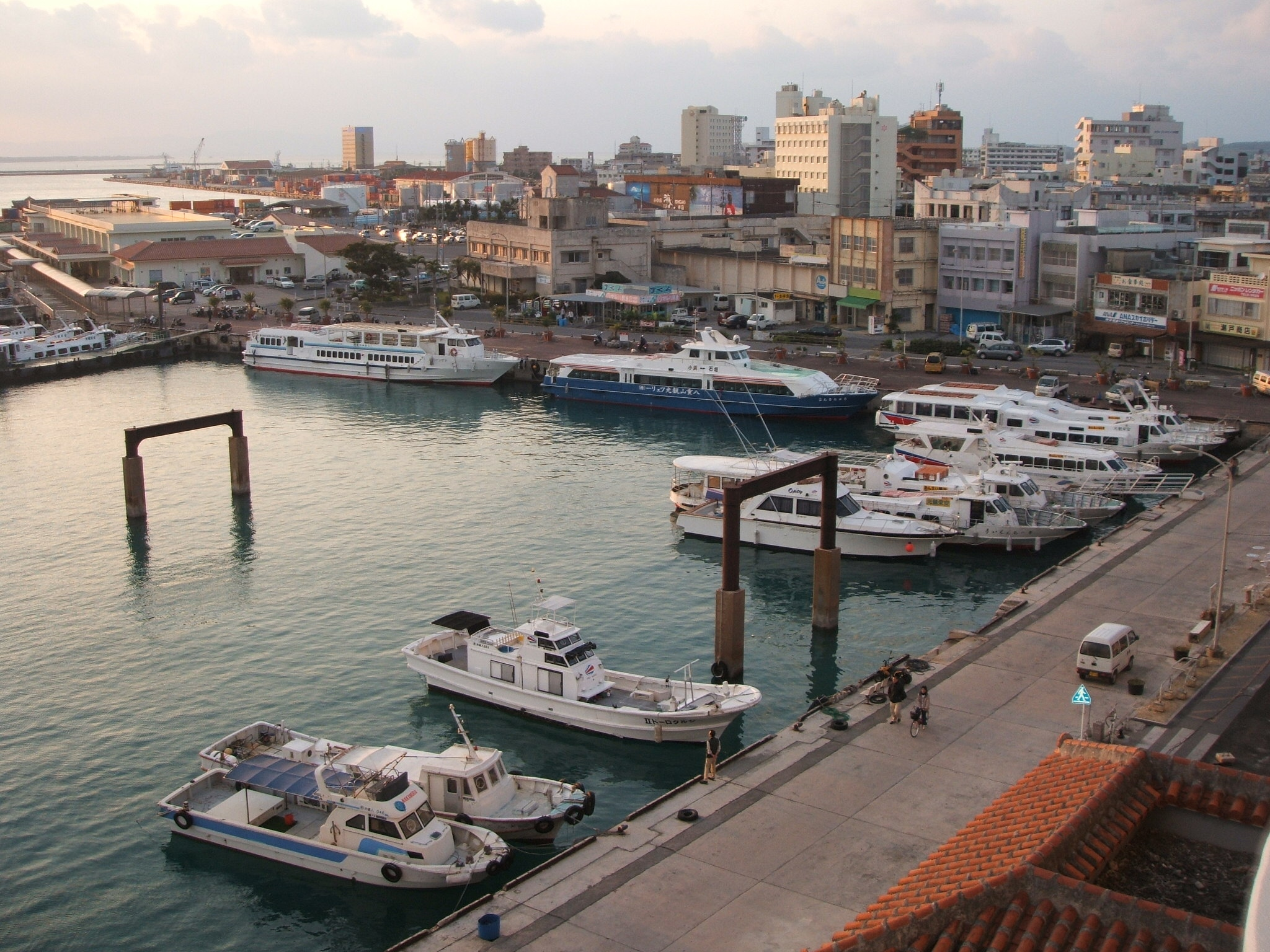 石垣港の美崎町地区。ホテル・イーストチャイナシーより西北西の方向を見る。左奥の建物が離島ターミナル。右下の橙色の瓦は同ホテルの3階部分。地図はこちら。